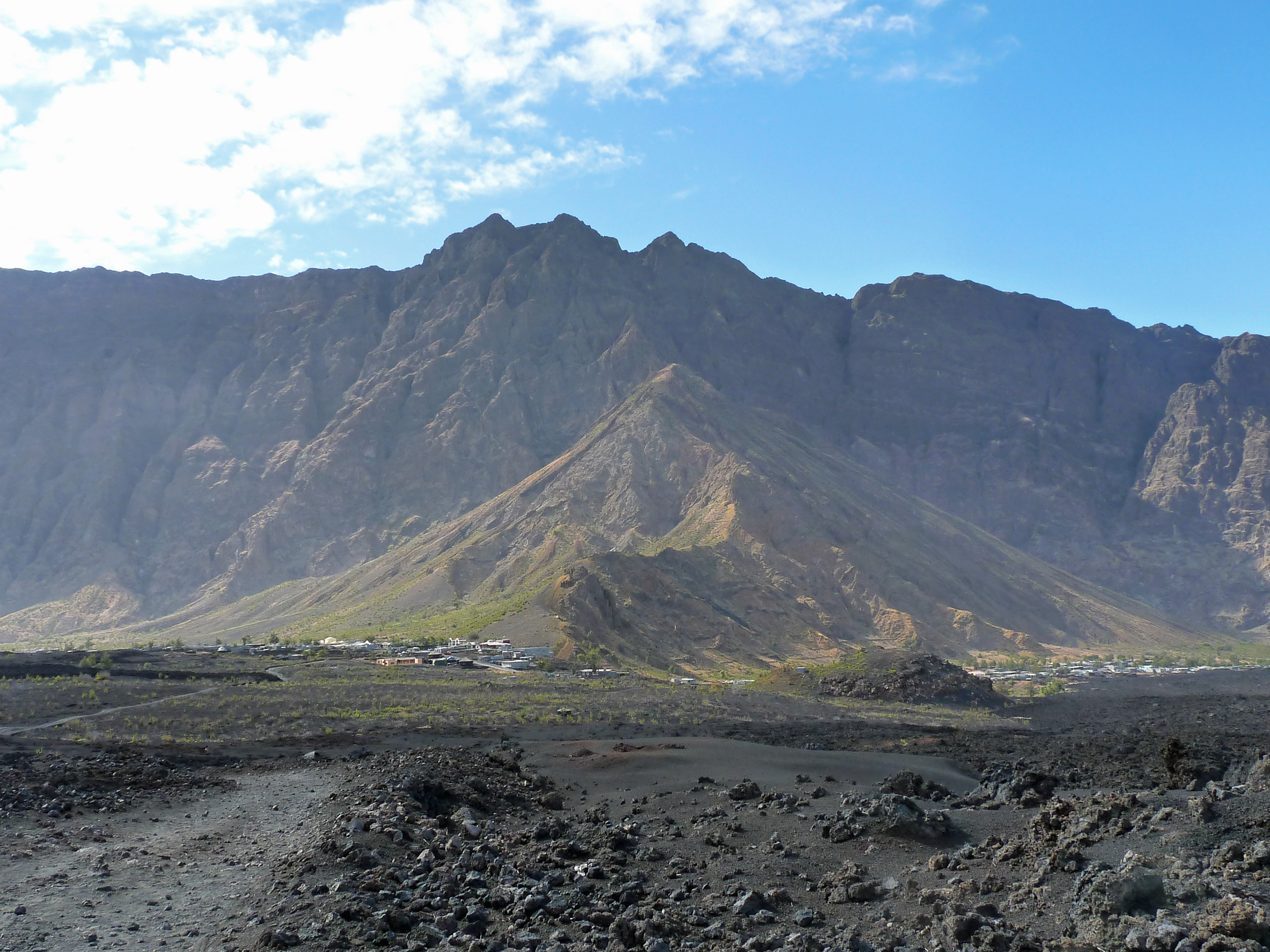 Chã das Caldeiras (Cap-Vert) : les deux villages au pied de la Bordeira qui entoure le site (Portela à gauche ; Bangaeira à droite)